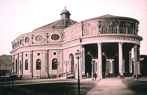 Teatro “Guzmán Blanco”, actual Teatro Municipal de Caracas “Alfredo Sadel”.